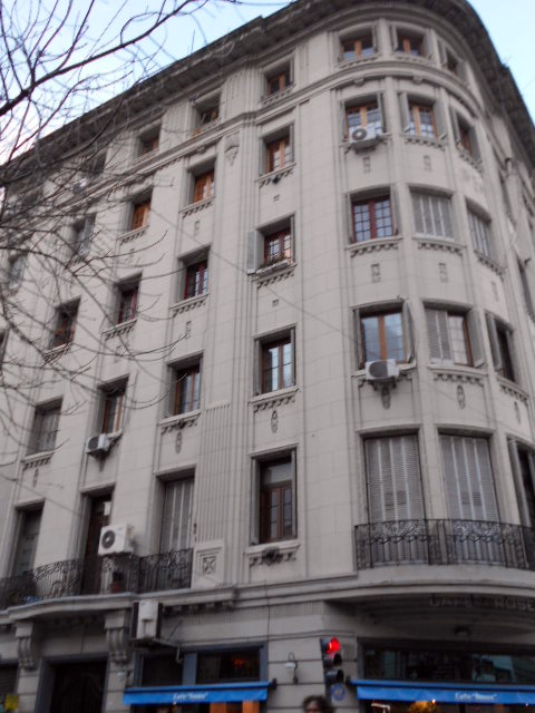 Edificio Corrientes 3695 Arq. Alejandro Virasoro